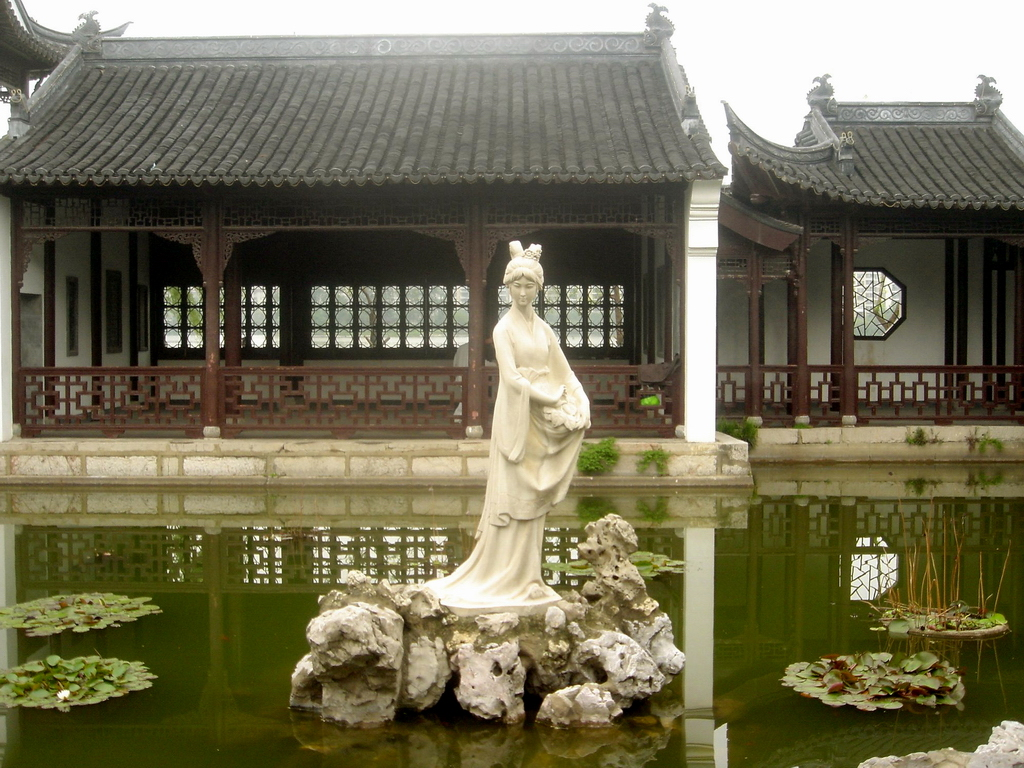 莫愁湖莫愁女雕塑